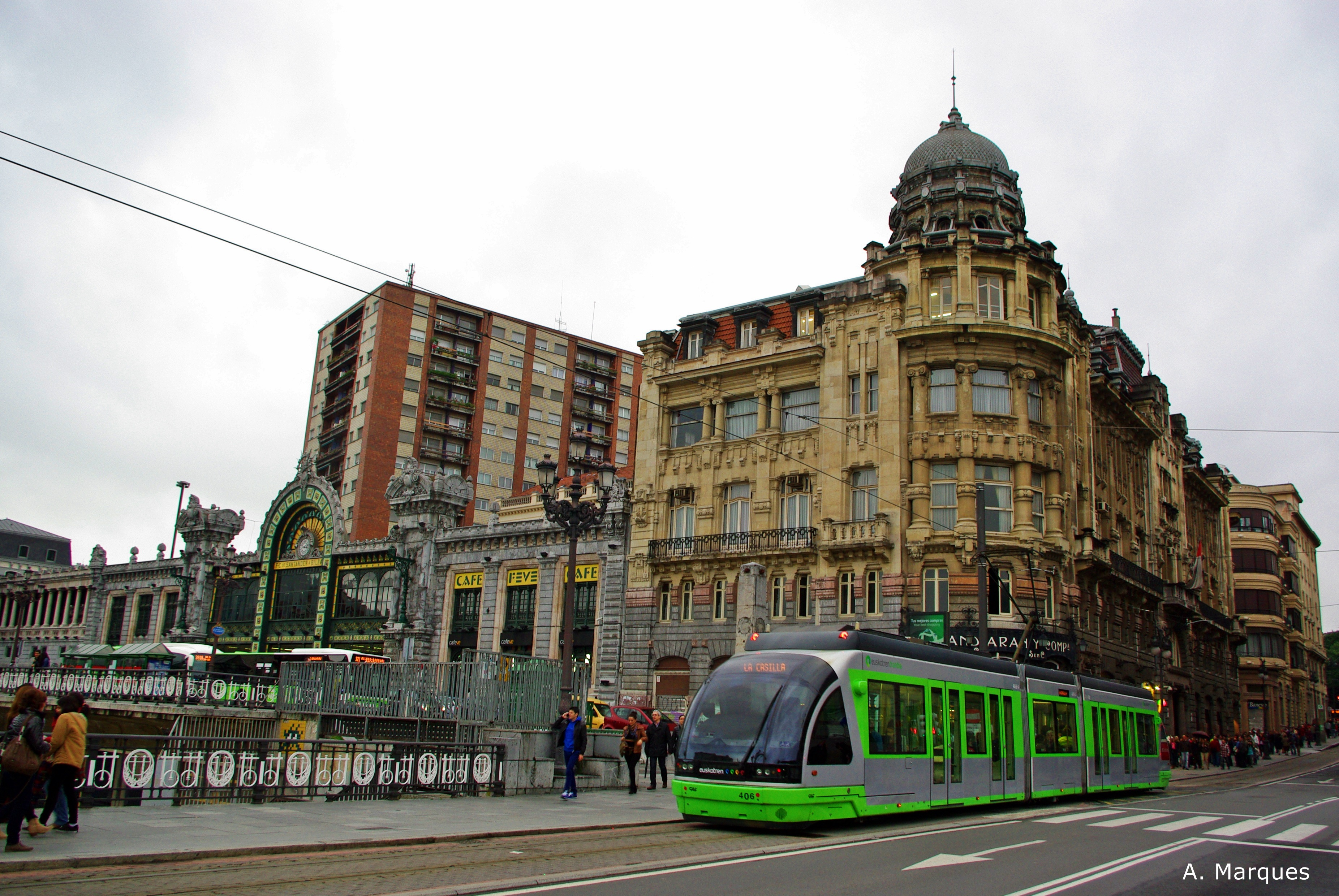 Aprovechando una visita al centro de la capital del mundo mundial, no pude dejar pasar la oportunidad de afotar el tranvia, asignatura pendiente desde hace años. Próximo objetivo: tranvía de Parla. Pues bien bonico, ¿eh? Gracias por pasaros, un saludo.